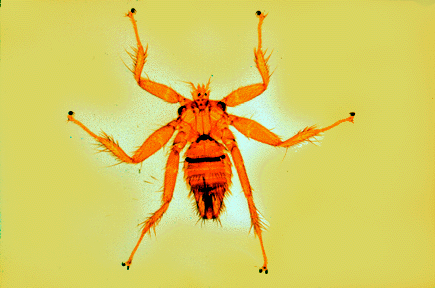 Lausfliege, Art aus Amerika (?)